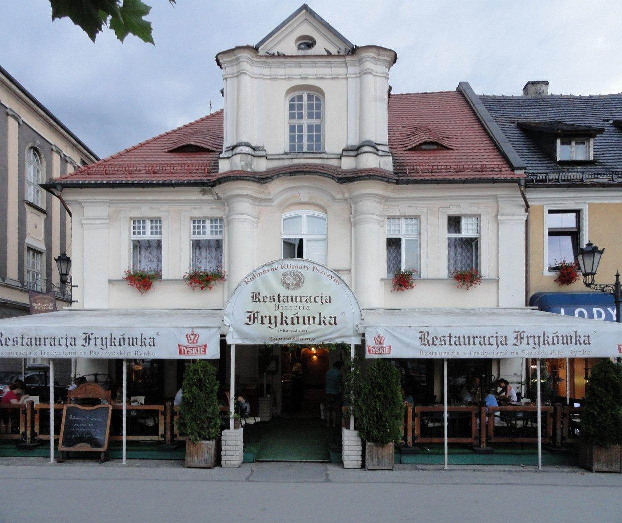 Rynek 3 obecnie.